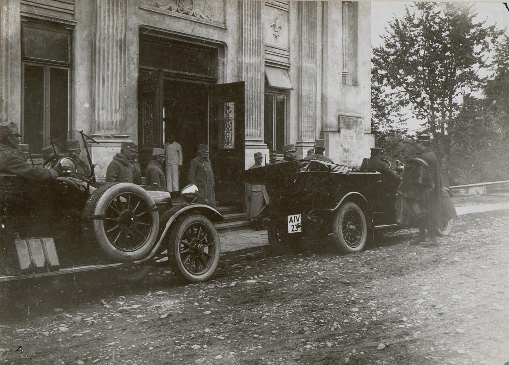 Kalusz, Erzherzog Friedrich beim 3. Armeekommando